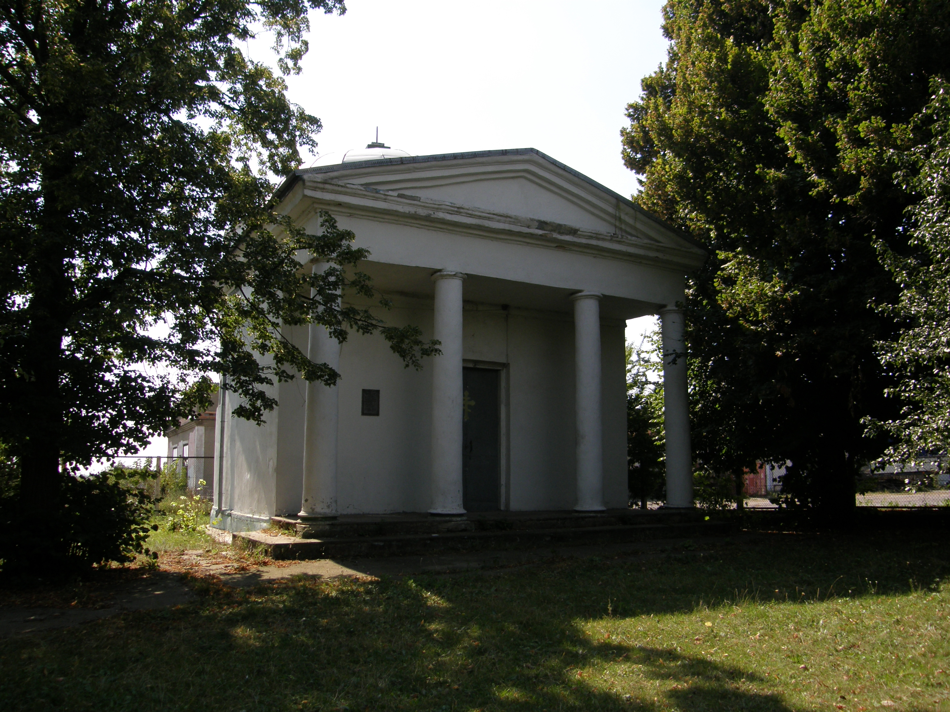 Каплиця-мавзолей Маньковських (мур.), Чернівці, вул. Леніна, 170/1